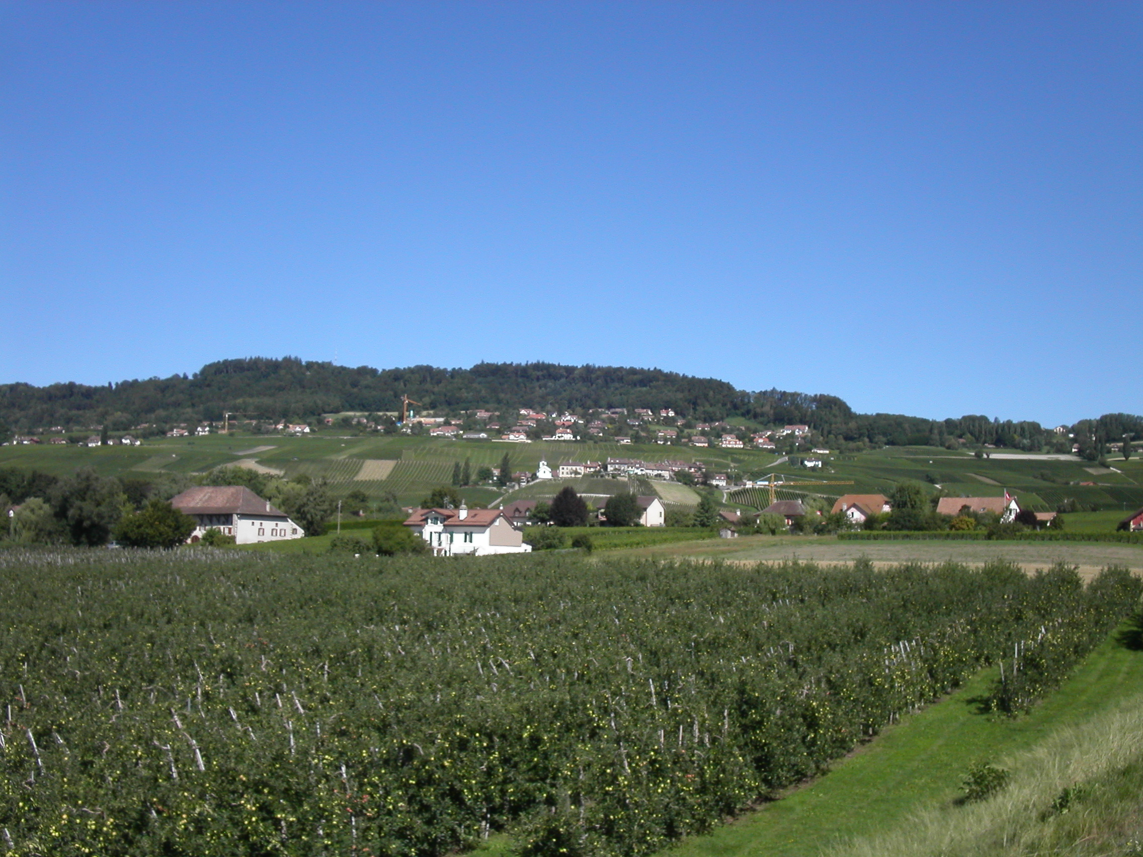 Vue de Féchy, canton de Vaud, Suisse.